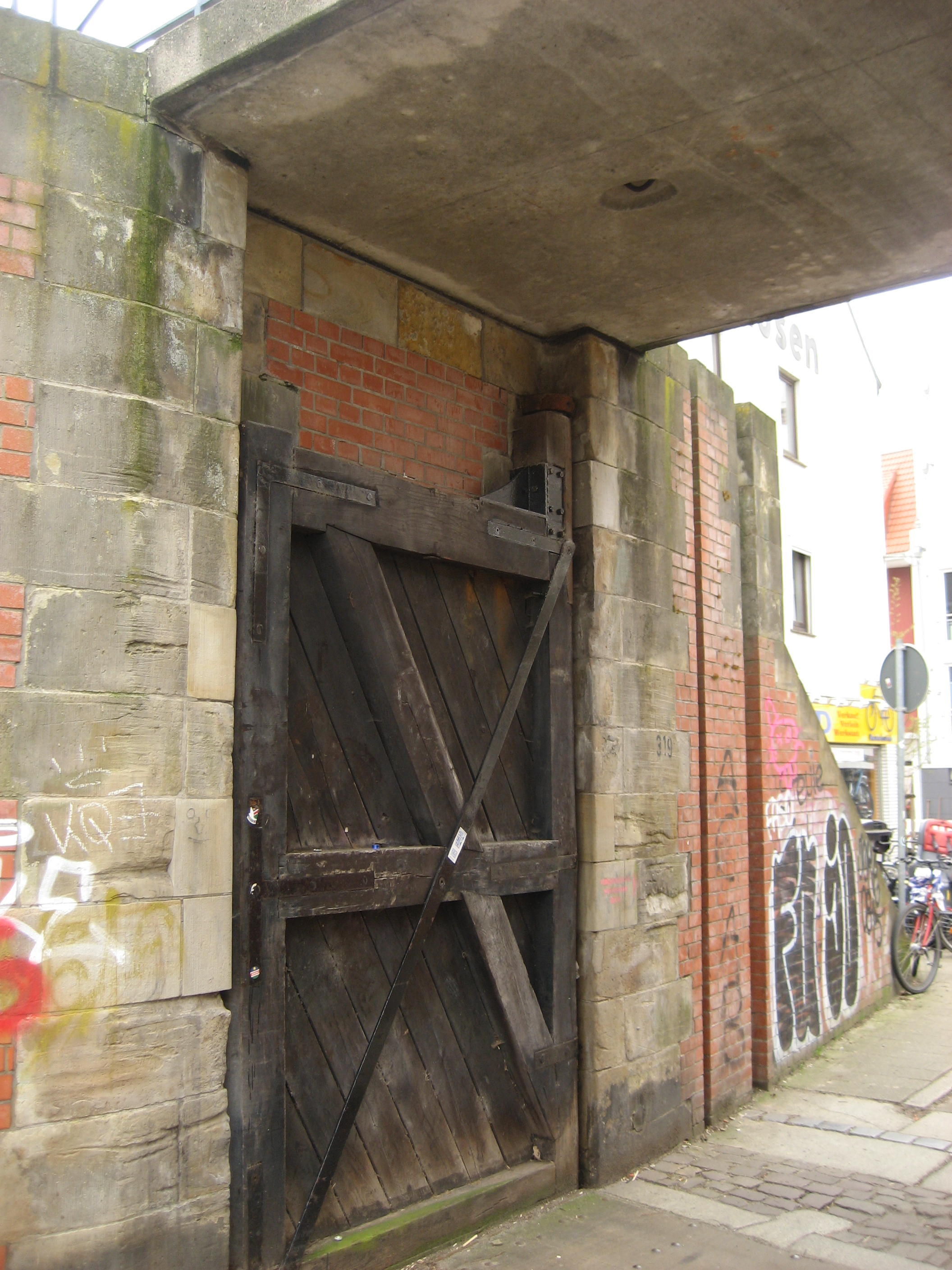 Deichschart am Buntentor, Bremen-Neustadt; Blick mit Weser im Rücken